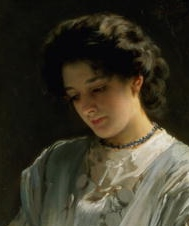 Détail d'un tableau de Thomas Kennington datant de 1885, utilisé pour illustrer une édition parue en 1997 d'Emma de Jane Austen en français